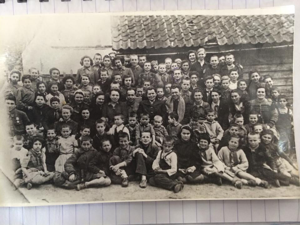 צביה וילדשטיין בתמונה קבוצתית עם יתומים ויתומות בברית המועצות